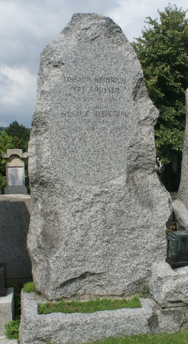 Hedwig Bleibtreu-Pötzleinsdorfer Friedhof (F-88/89)